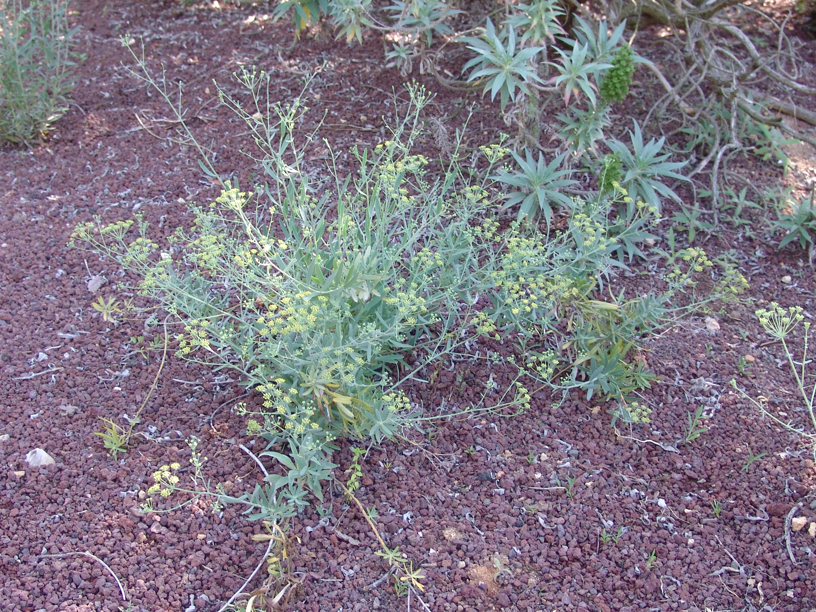 Bupleurum salicifolium al Jardí Botànic de Barcelona.